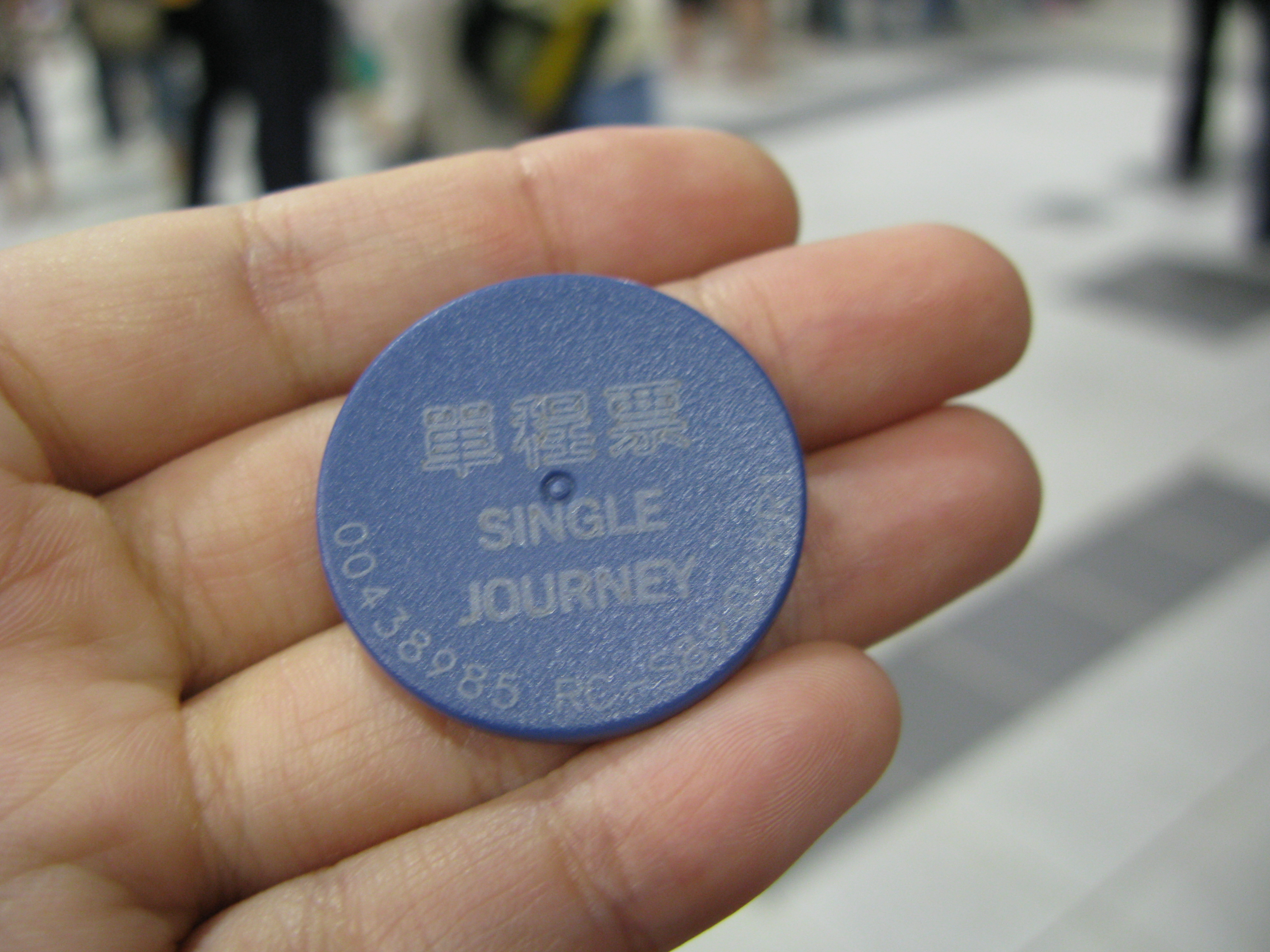 高雄捷運-單程票 Kaohsiung MRT Token